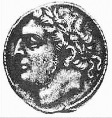 Moneta coniata nel I secolo a.C. che ritrae il re numida Giugurta